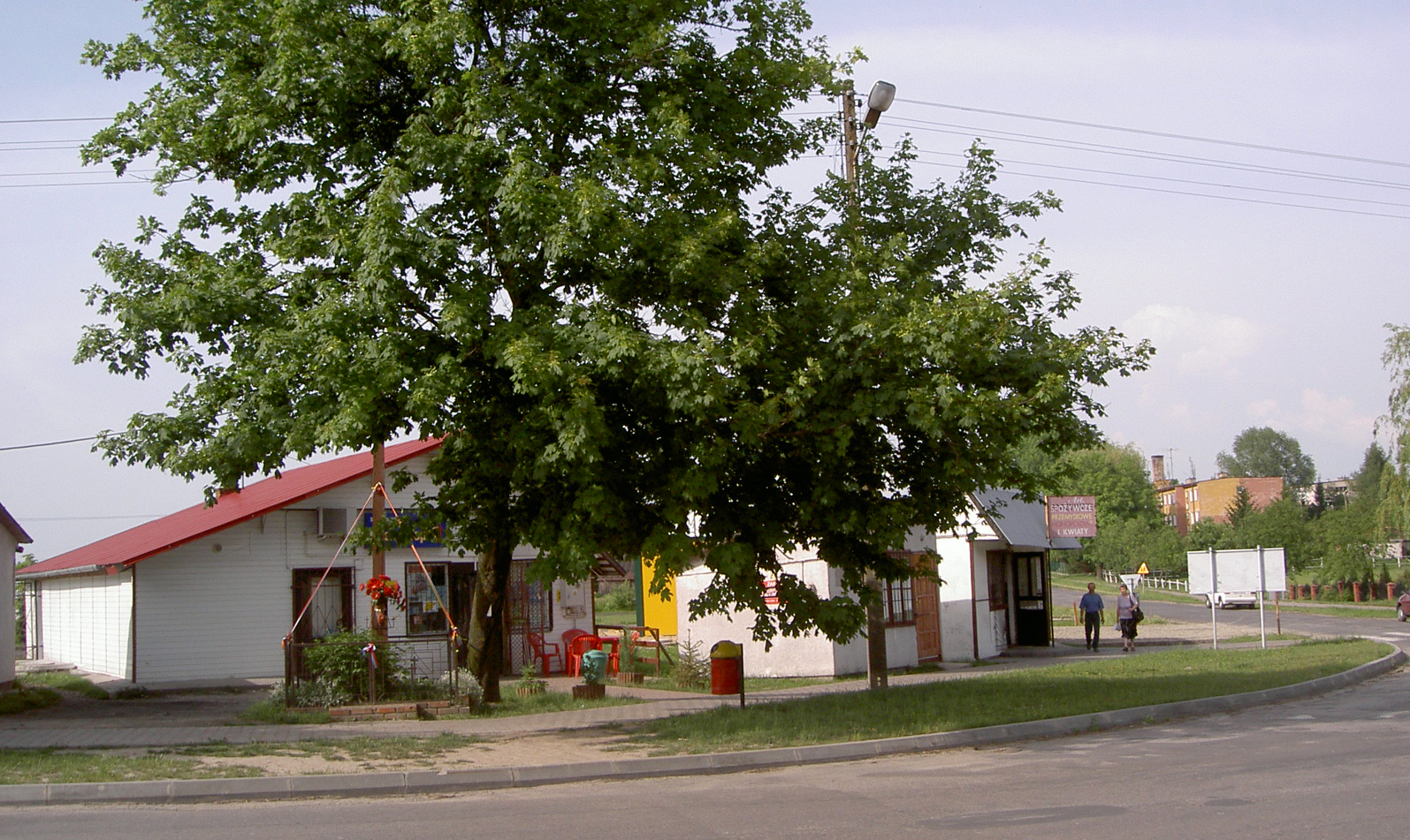 Dołhobyczów, Poland • Centrum / Centre